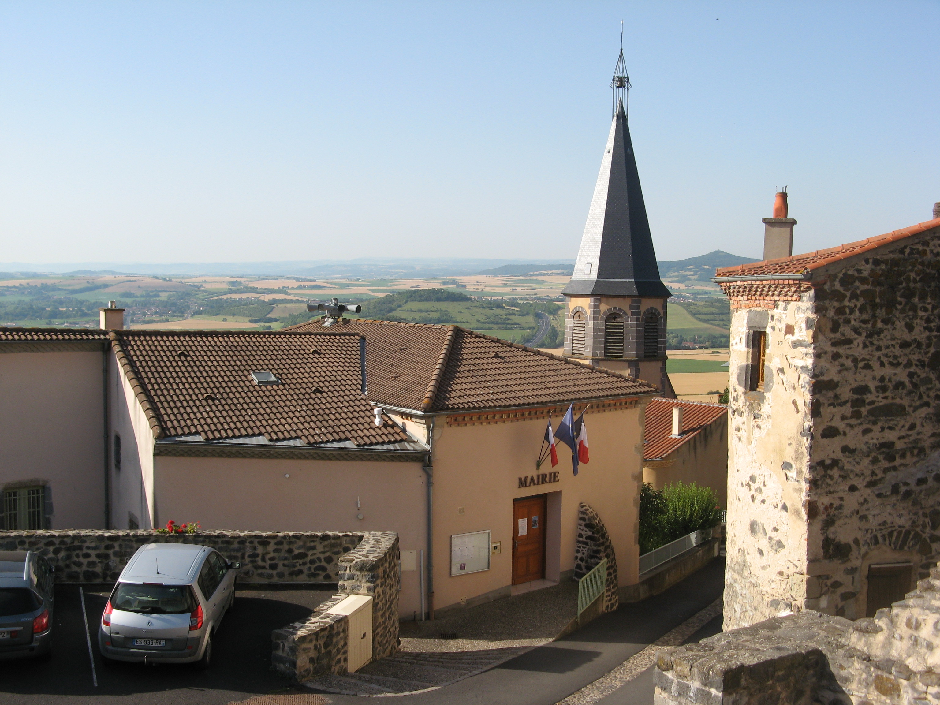 Le Broc, mairie